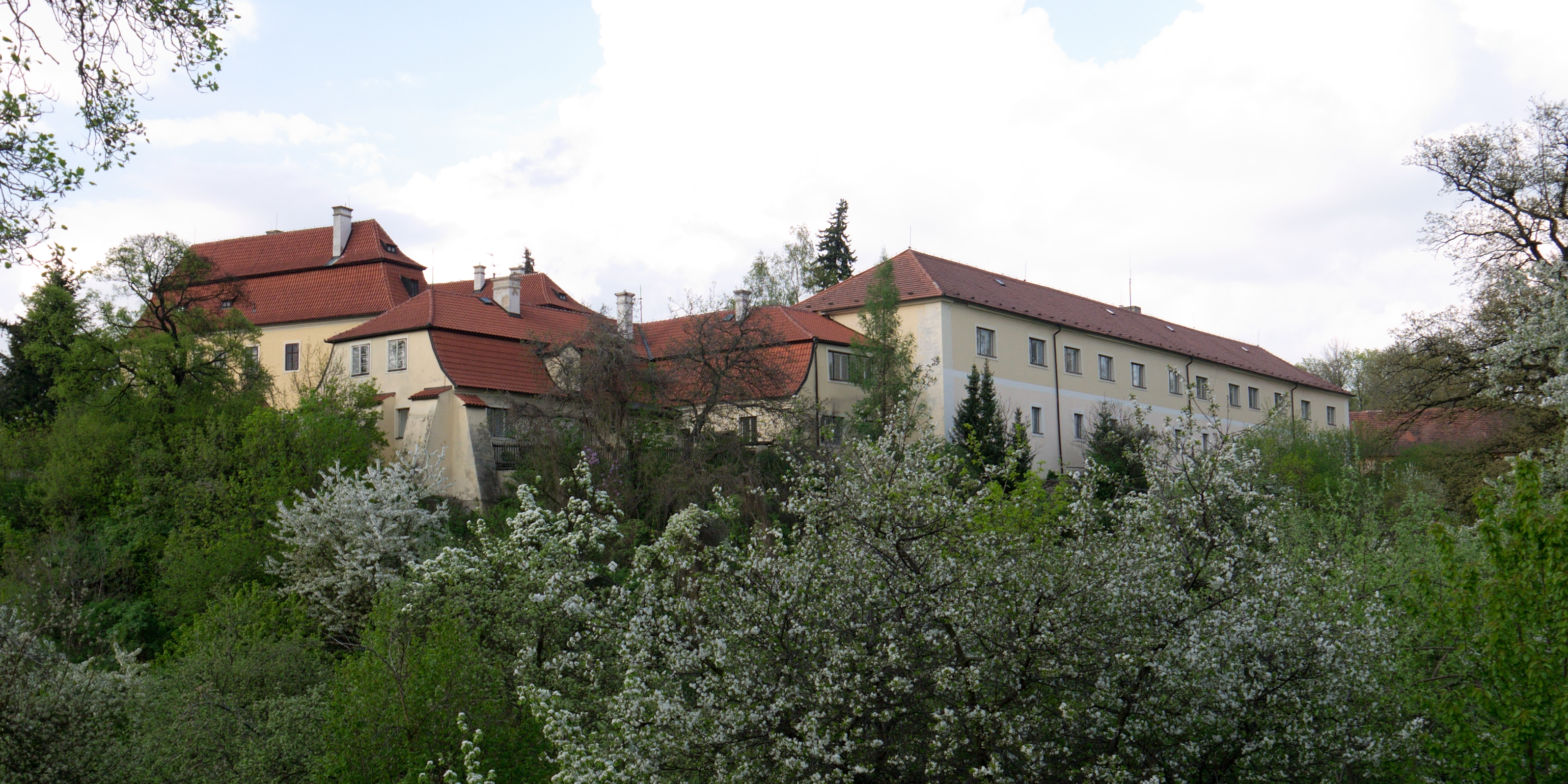 Starý zámek, Vrbnovská 27/5, Hořovice